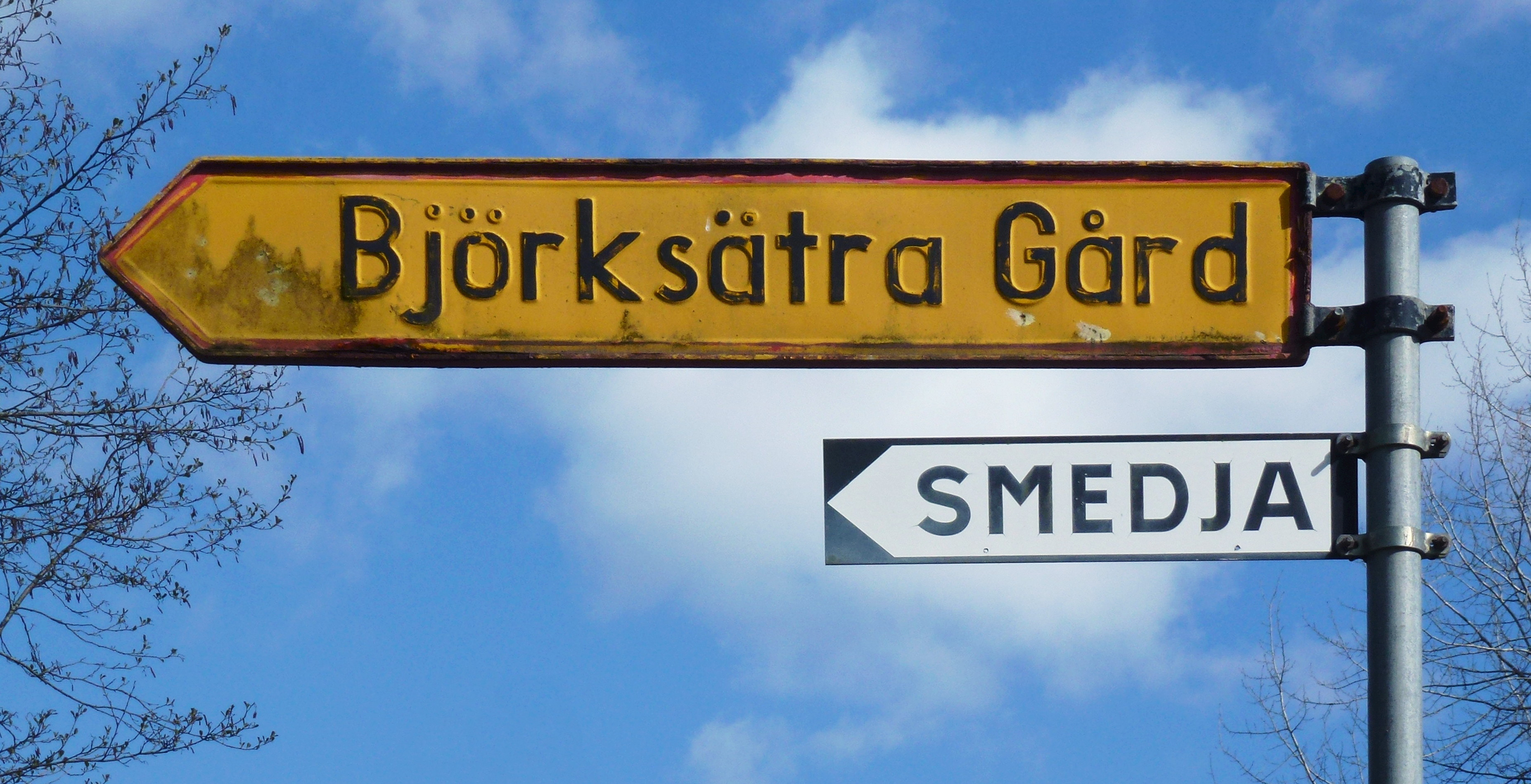 Björksättra gård skylt vid Ebbadalsvägen